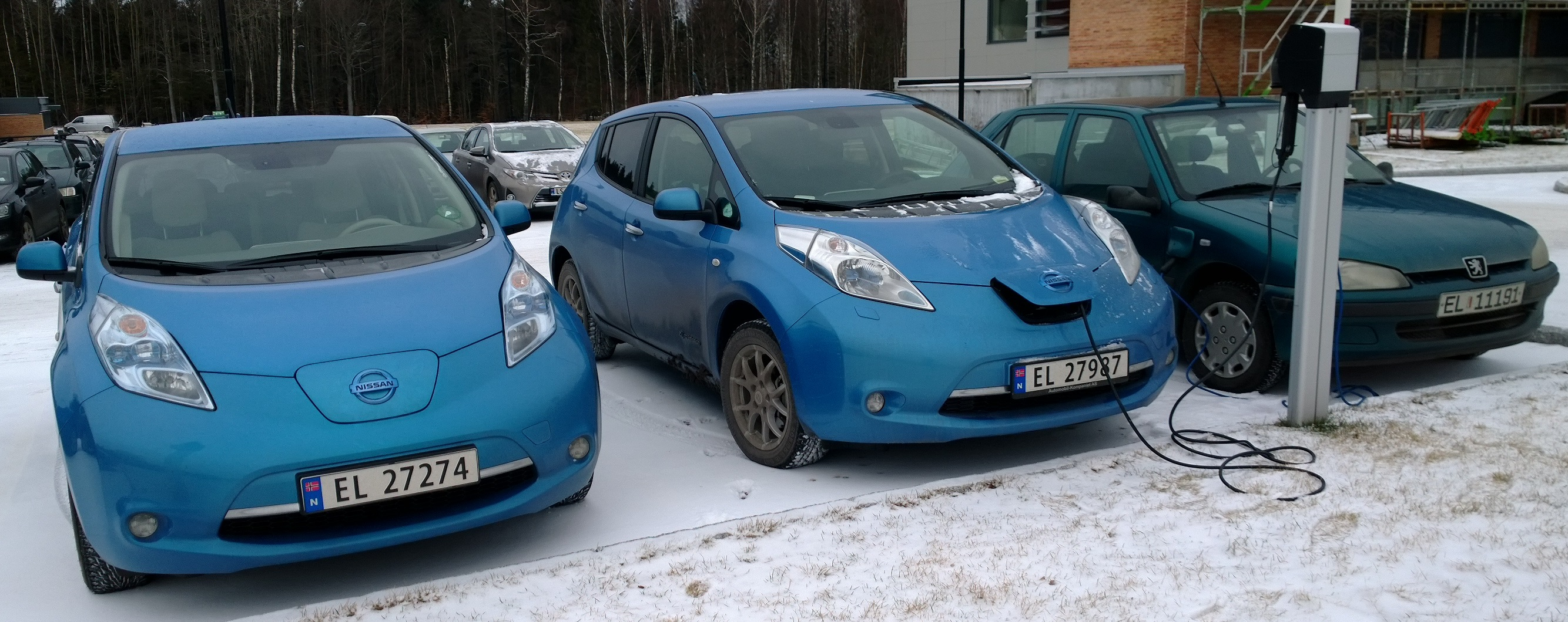 El-biler har reservert EL, uavhengig av hvor i landet de er registrert. Her ved en ladestasjon.